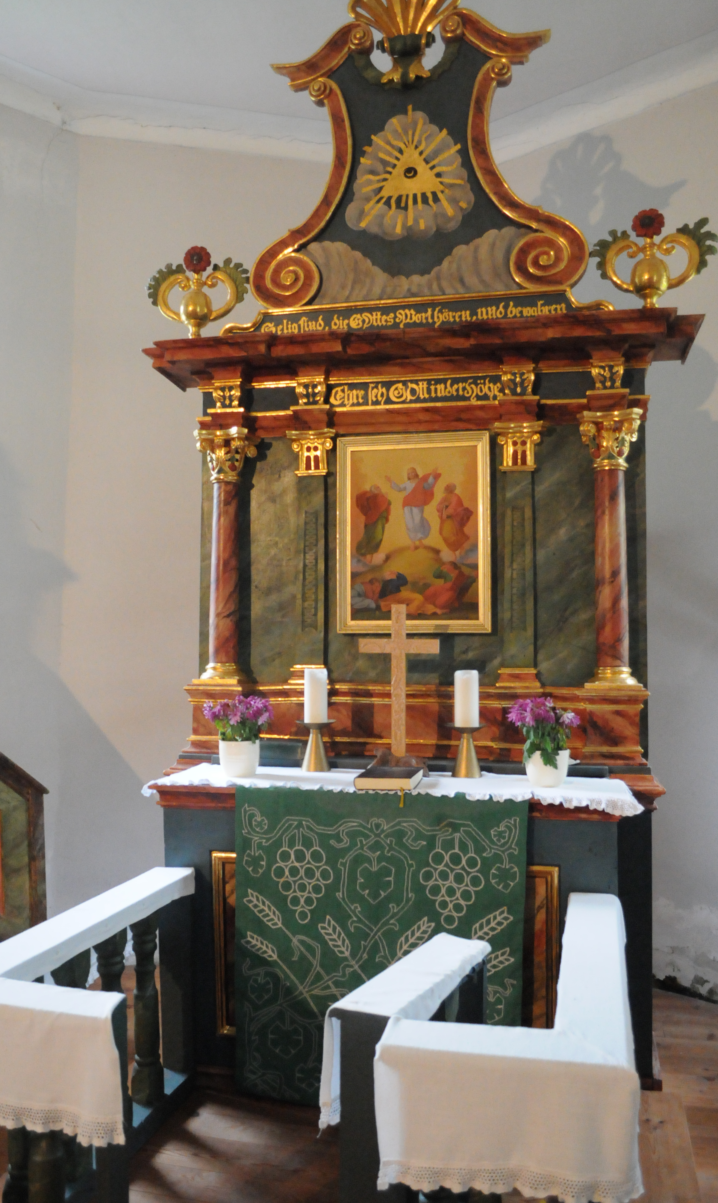 Glaubenskirche Sankt Johann am Tauern, Altar